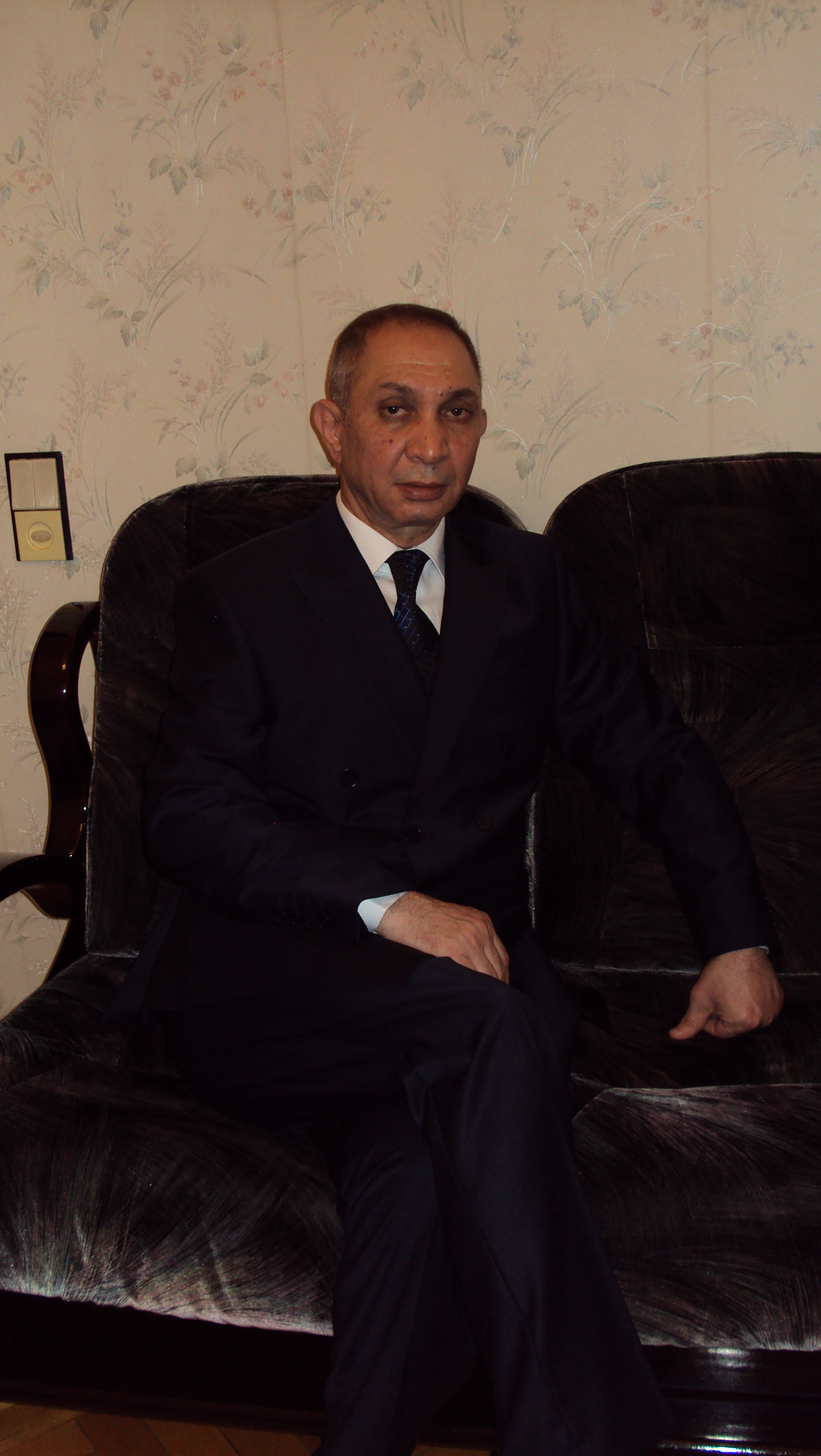 Аждаров Тахмасіб Гусейн огли (17 квітня 1964, Баку, СРСР) — вчений Азербайджану та України; доктор економічних наук (2002); у період праці — Головний Радник Державної Податкової Служби 1-го ступеня — Генерал Податкової служби; Майстер спорту по самбо і бігу.